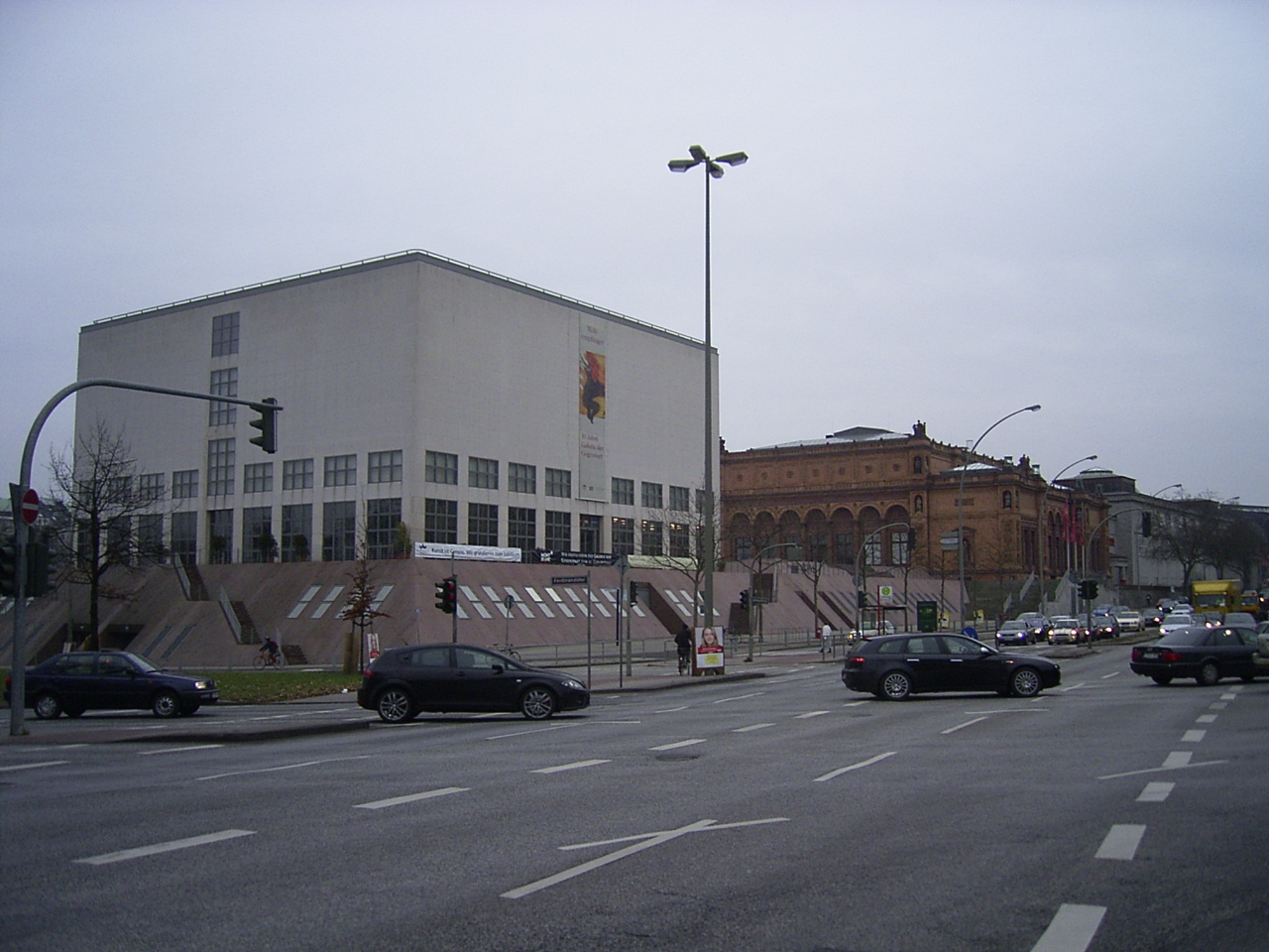 Die drei Ausstellungshallen der Hamburger Kunsthalle in Hamburg-Altstadt. In der Mitte der Altbau von Georg Theodor Schirrmacher und Hermann von der Hude, rechts der Anbau von Fritz Schumacher und links der Neubau von Oswald Mathias Ungers für die Galerie der Gegenwart.